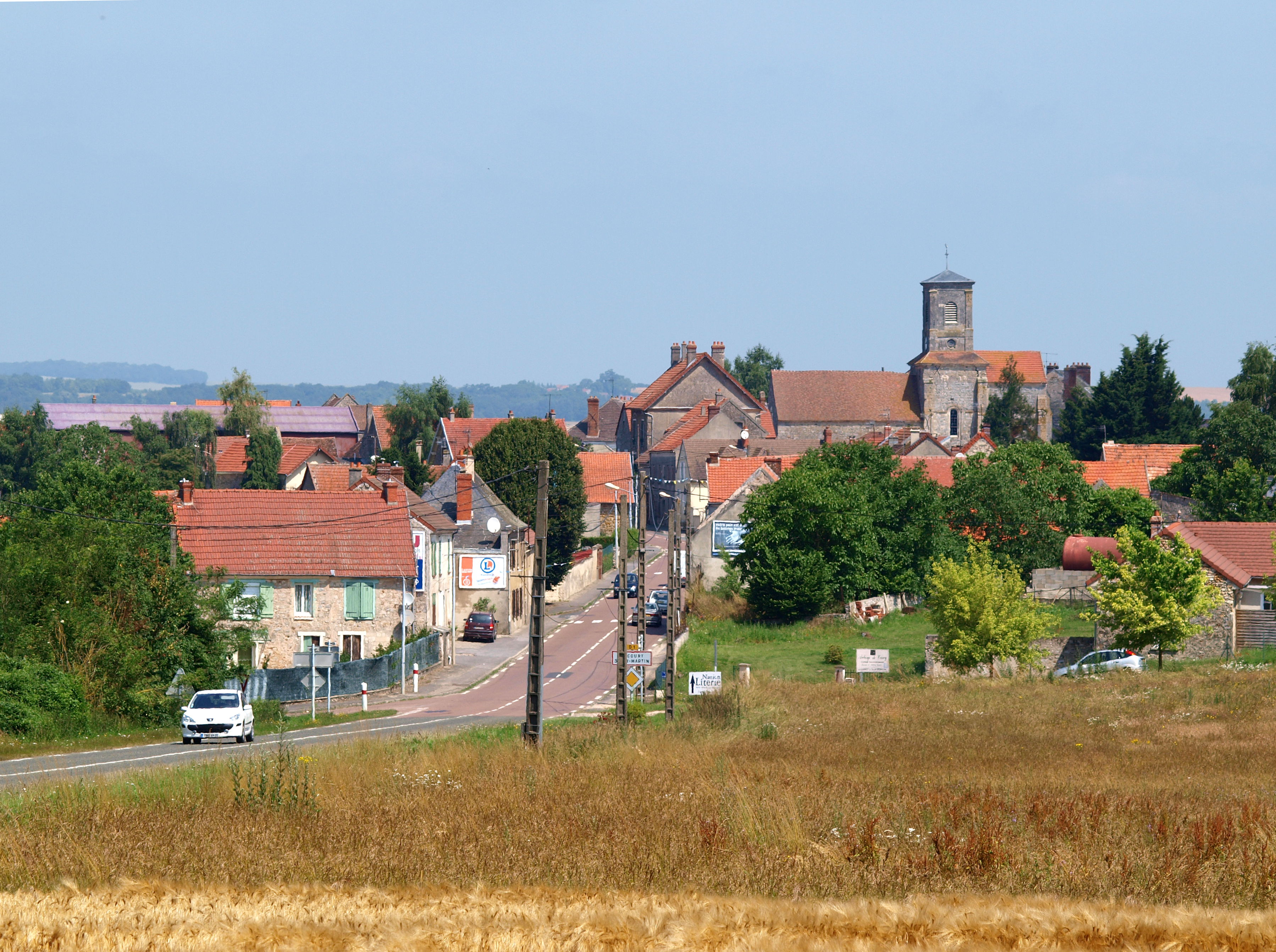 Rocourt-Saint-Martin (Aisne, France)